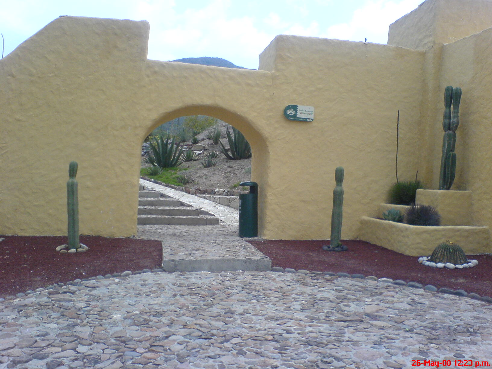 Entrada al "Jardin Botanico Ollintepetl", en el parque ecologico cubitos en pachuca, hidalgo, mexico